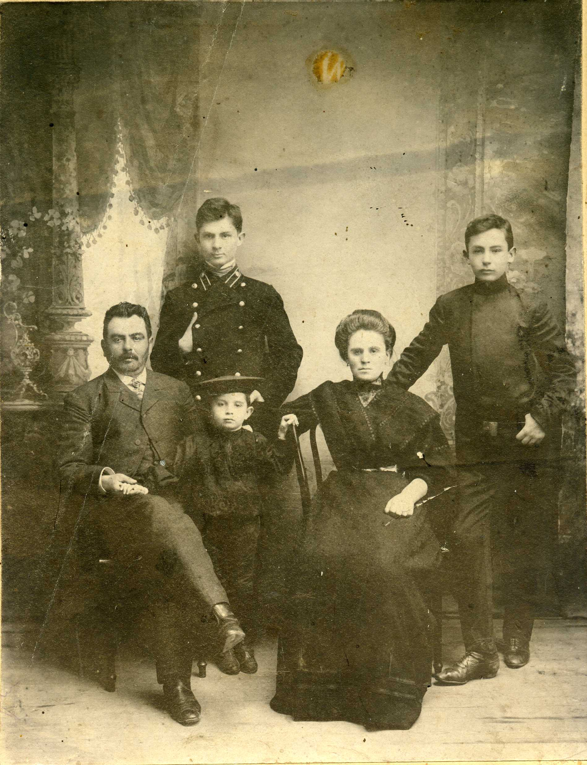 Семья Ганзбурга Александра Ильича.